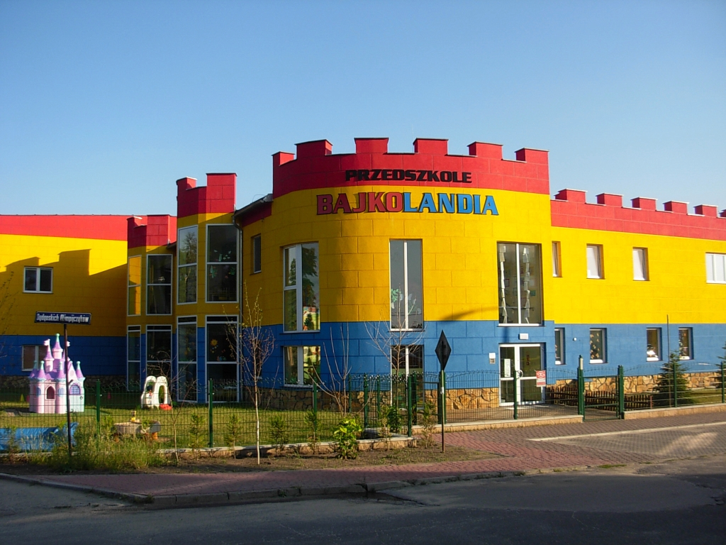 Przedszkole Bajkolandia na osiedlu Akademickie w dzielnicy Fordon